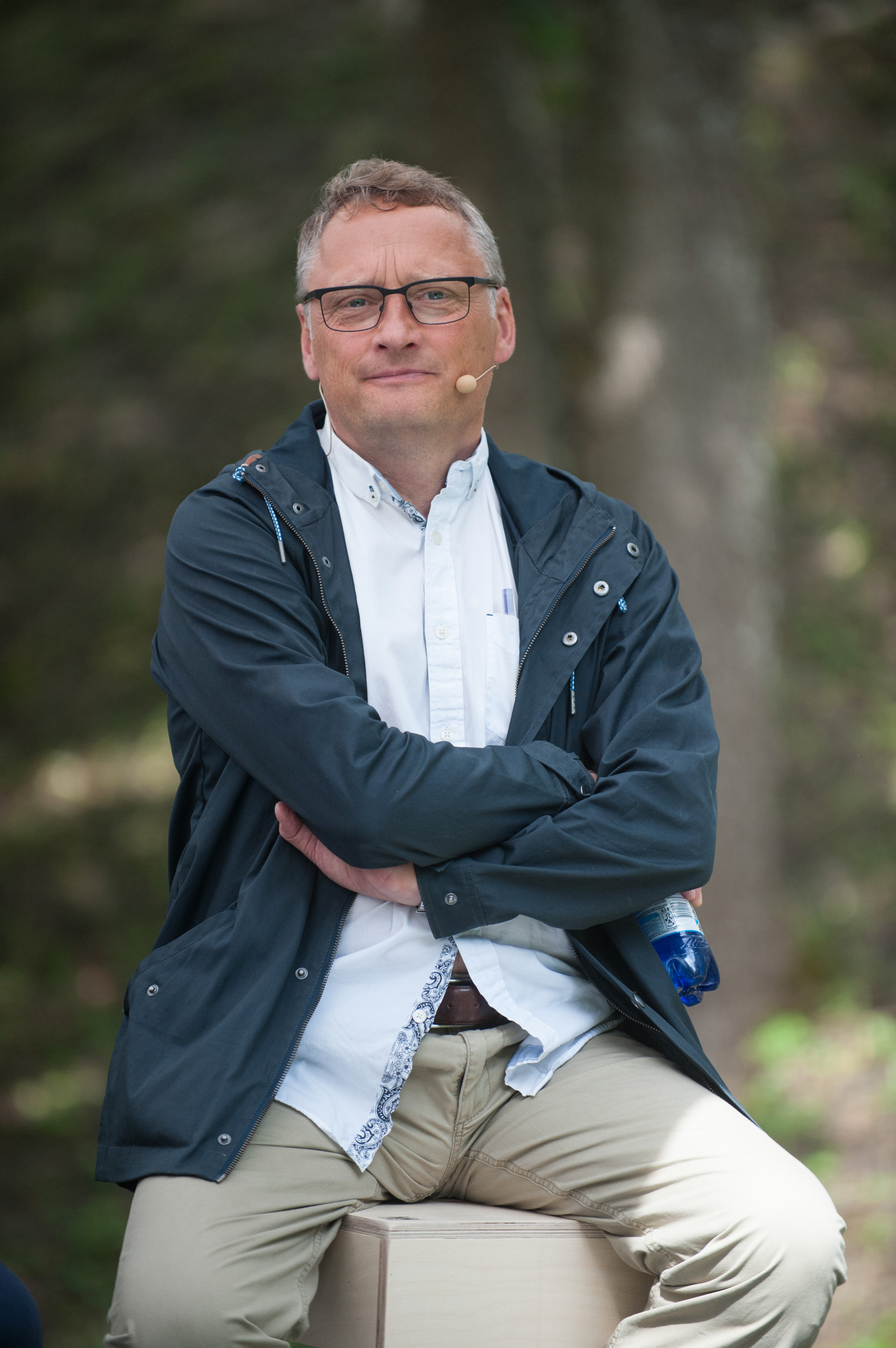 Arvamusfestival 2014: "Mis on riigi roll ettevõtluses?"